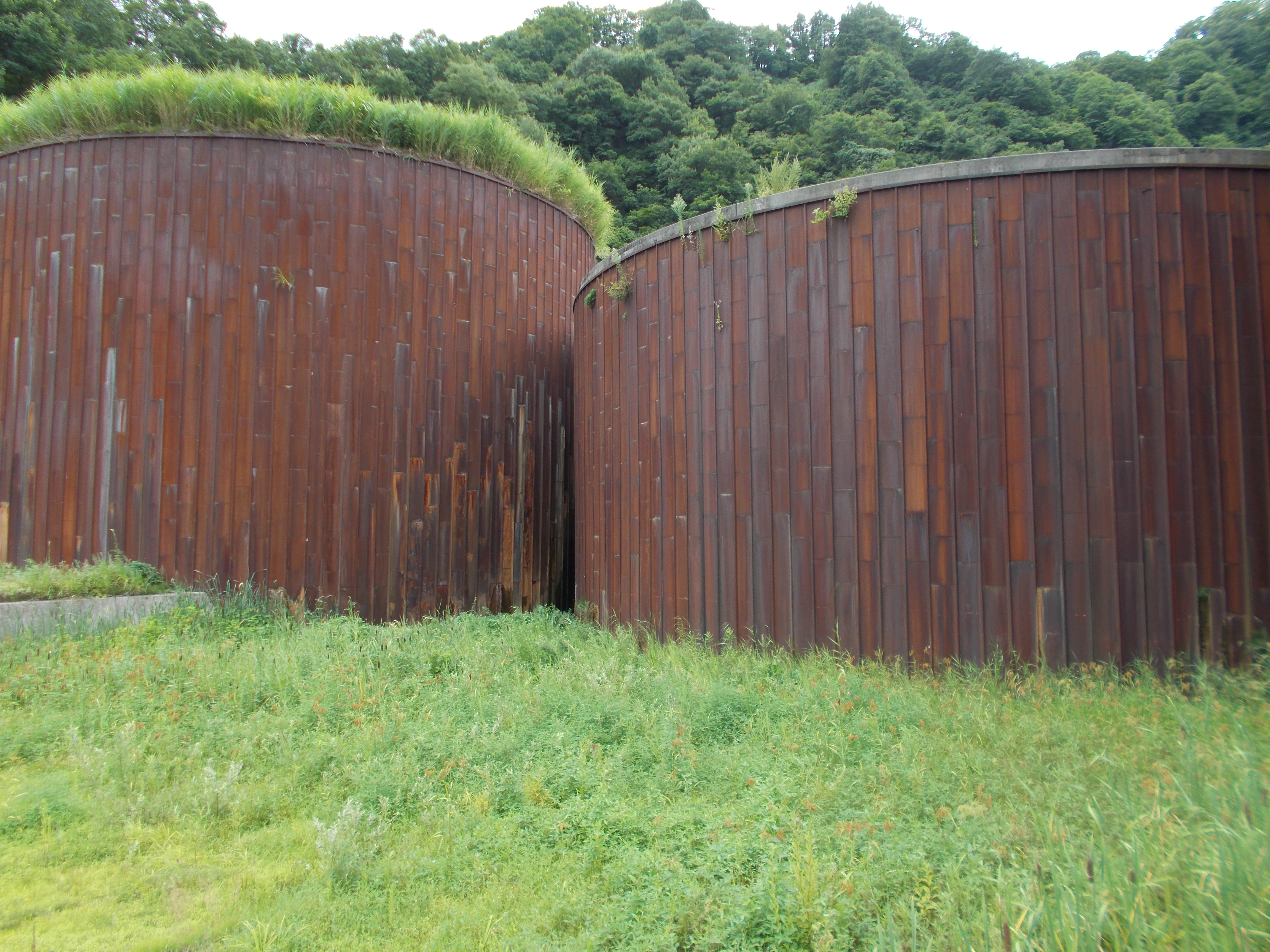 セルダムにおいてセルとセル間に空間を作ることによって、スリットダムとしての機能を持たせる